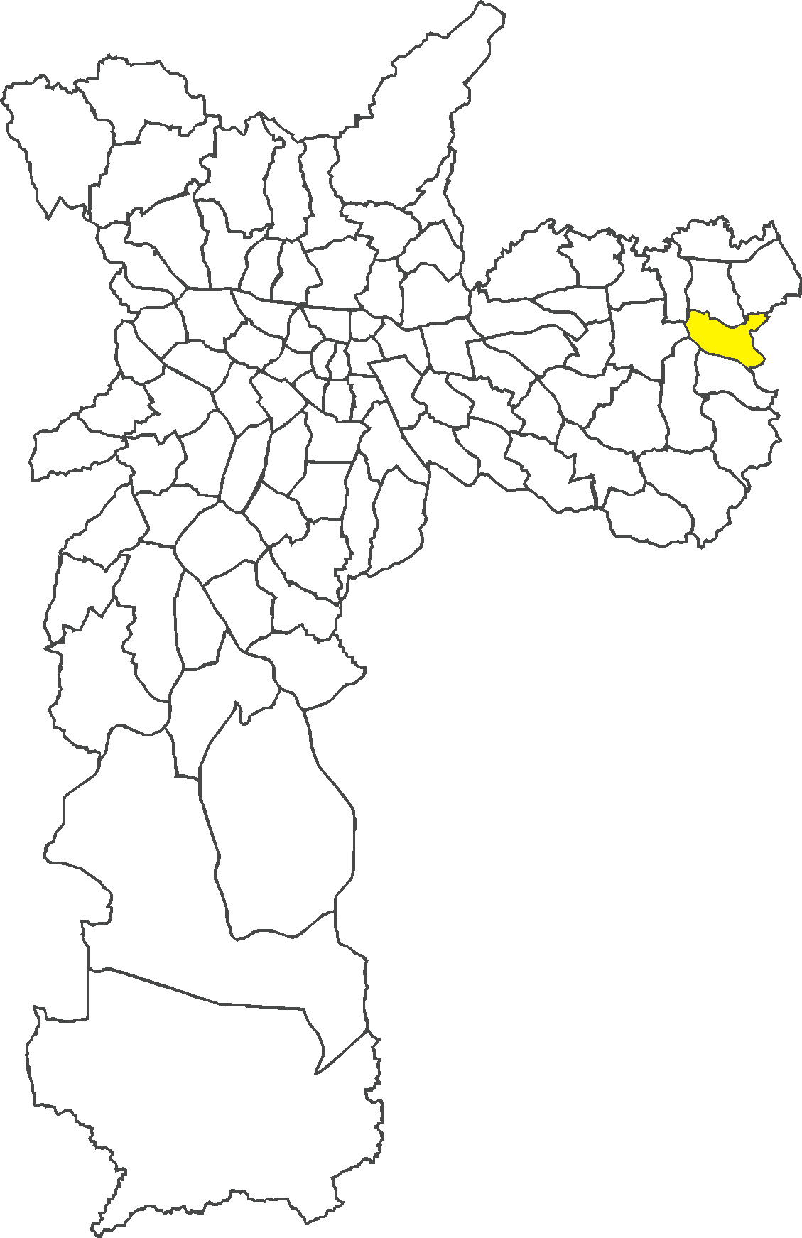 Localização do distrito de Lajeado no município de São Paulo.